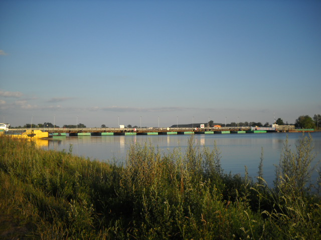 Most pontonowy w Sobieszewie.